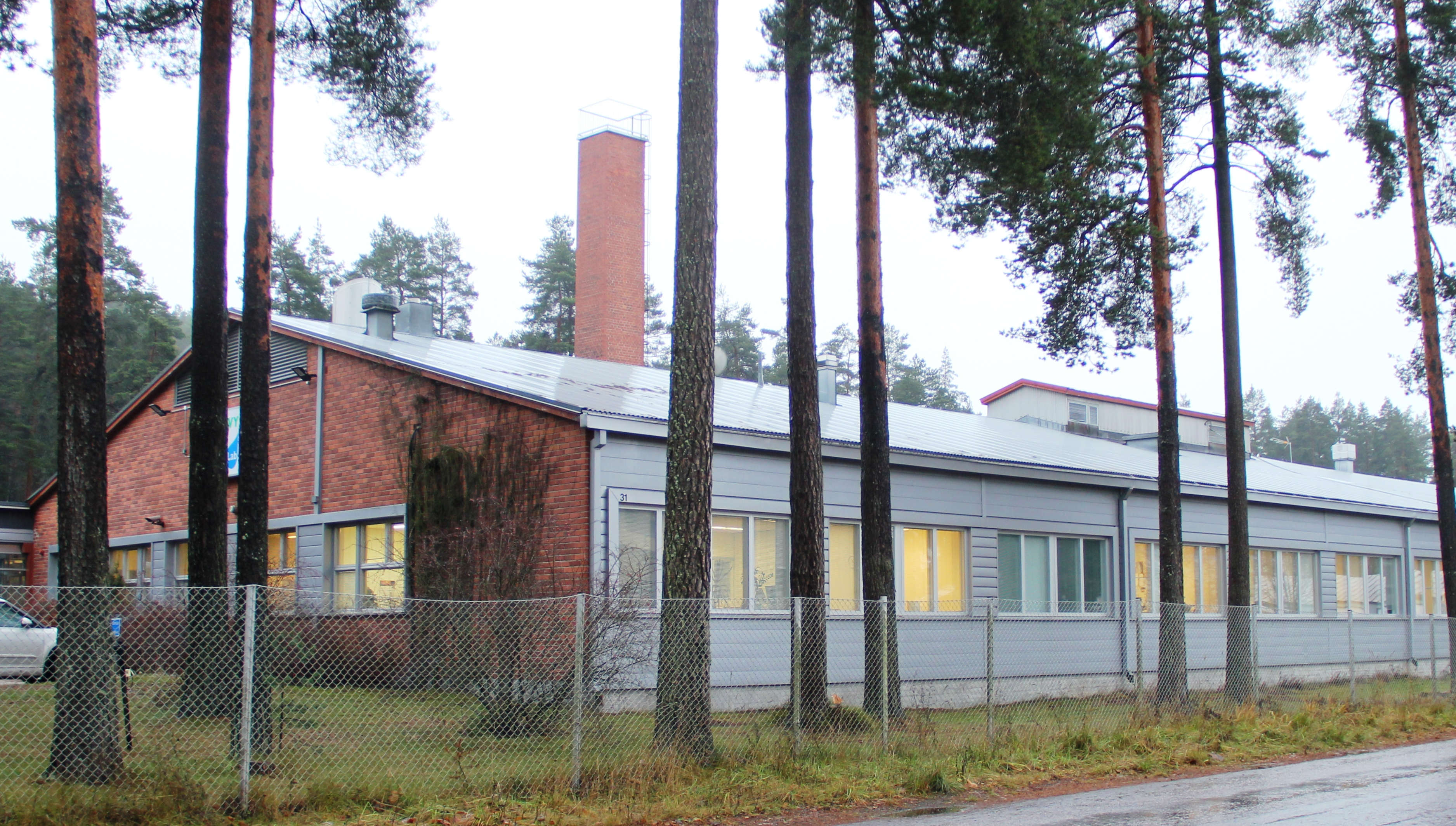 Vaaksa-Finlux tehdasrakennus Länsi-Louhentie, Lohja